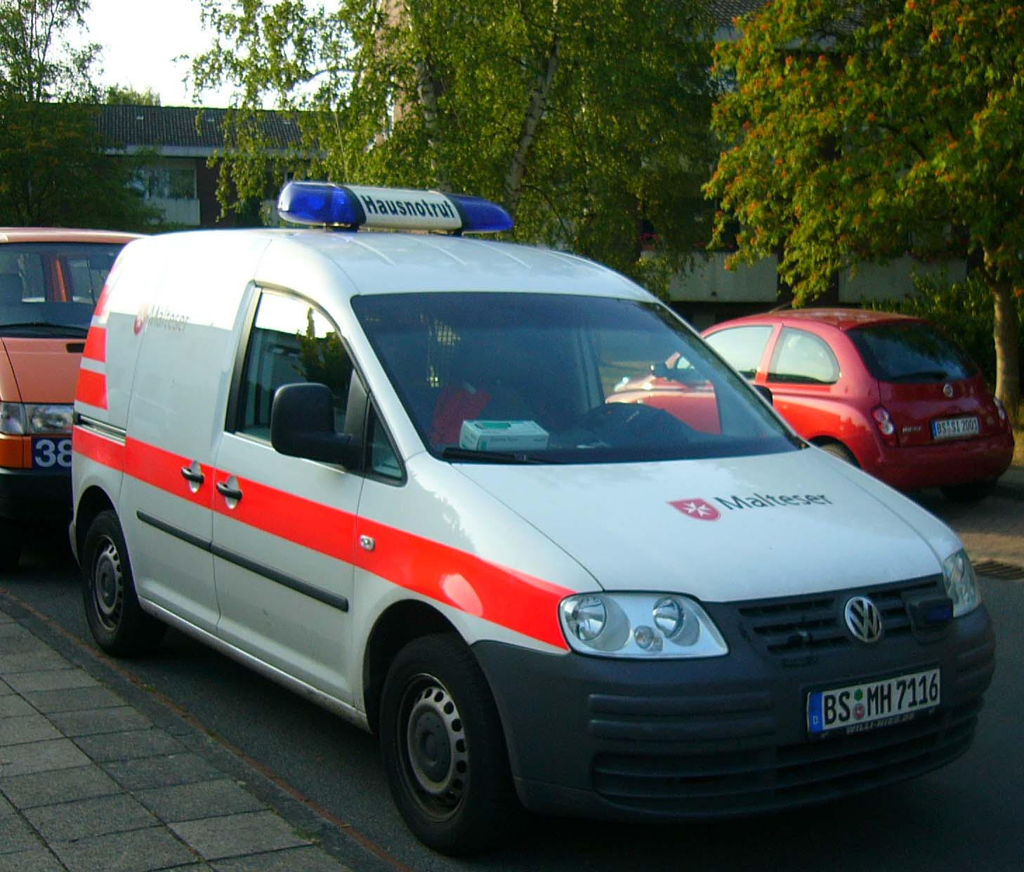 Einsatzfahrzeug des Malteser Hilfsdienstes (Hausnotruf, Volkswagen Caddy Typ 2K), Braunschweig